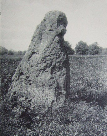 Menhir du Vieux-Poitiers, commune de Naintré, dans la Vienne. Monument historique. Photographie de Jules Robuchon.